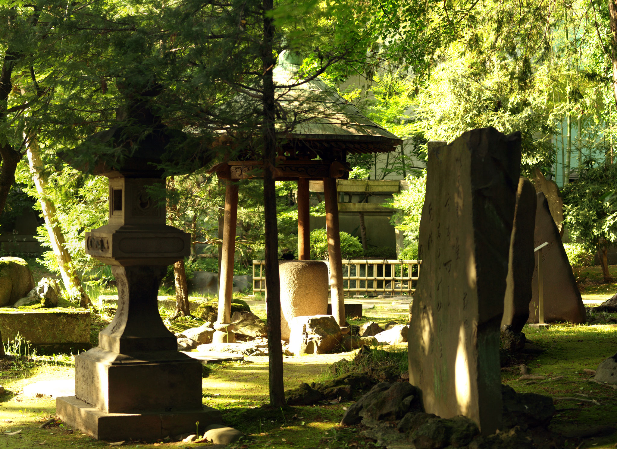 三囲神社の三柱鳥居と三本柱の屋根を持つ手水鉢。